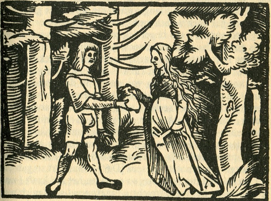 Holzschnitt der Ausgabe des Fortunatus von 1509